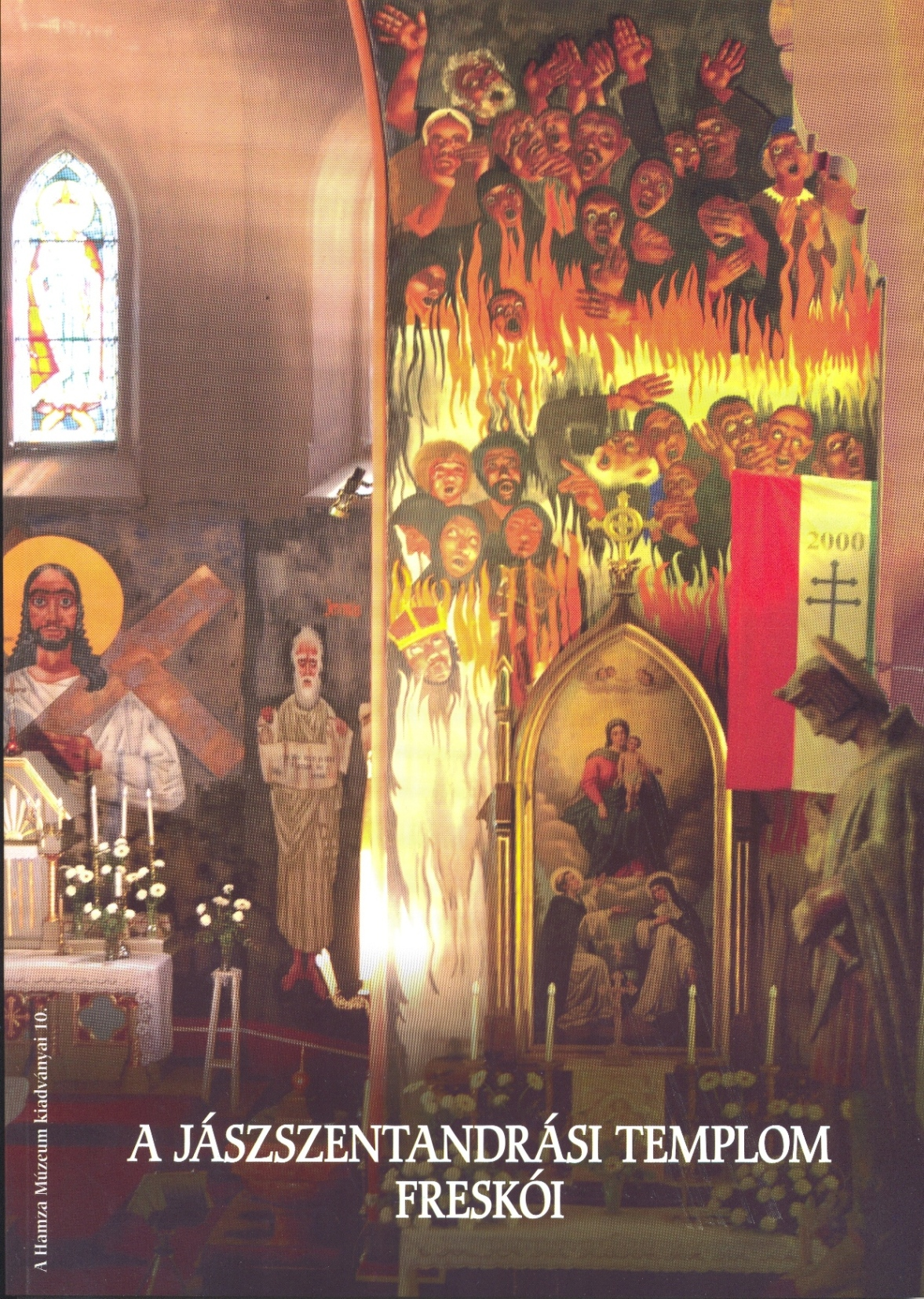 A jászszentandrási templom freskói c. könyv borítója